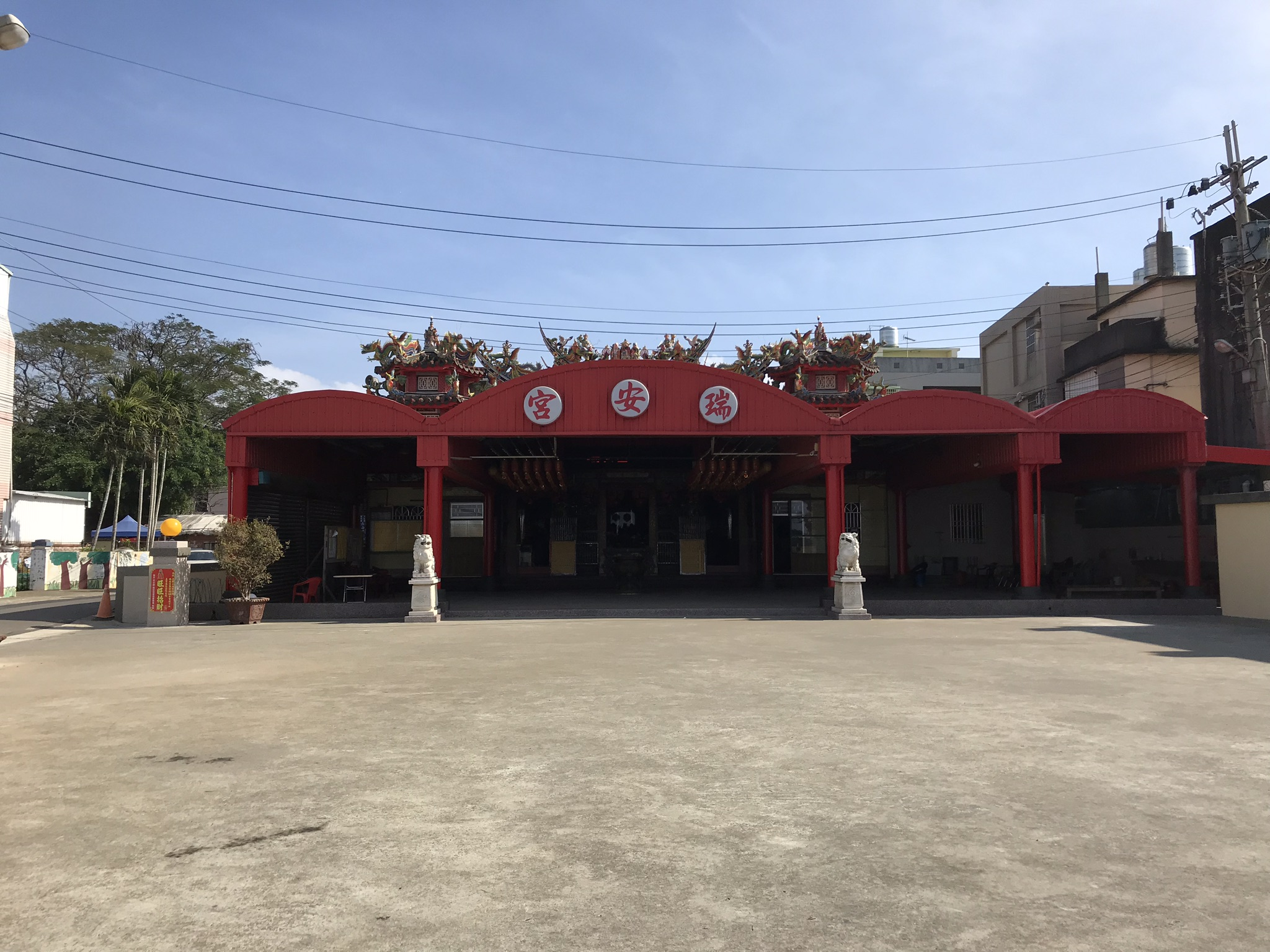 中文（台灣）: 大肚瑞安宮